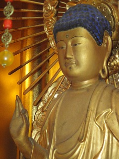 純心寺ご本尊 阿弥陀如来像